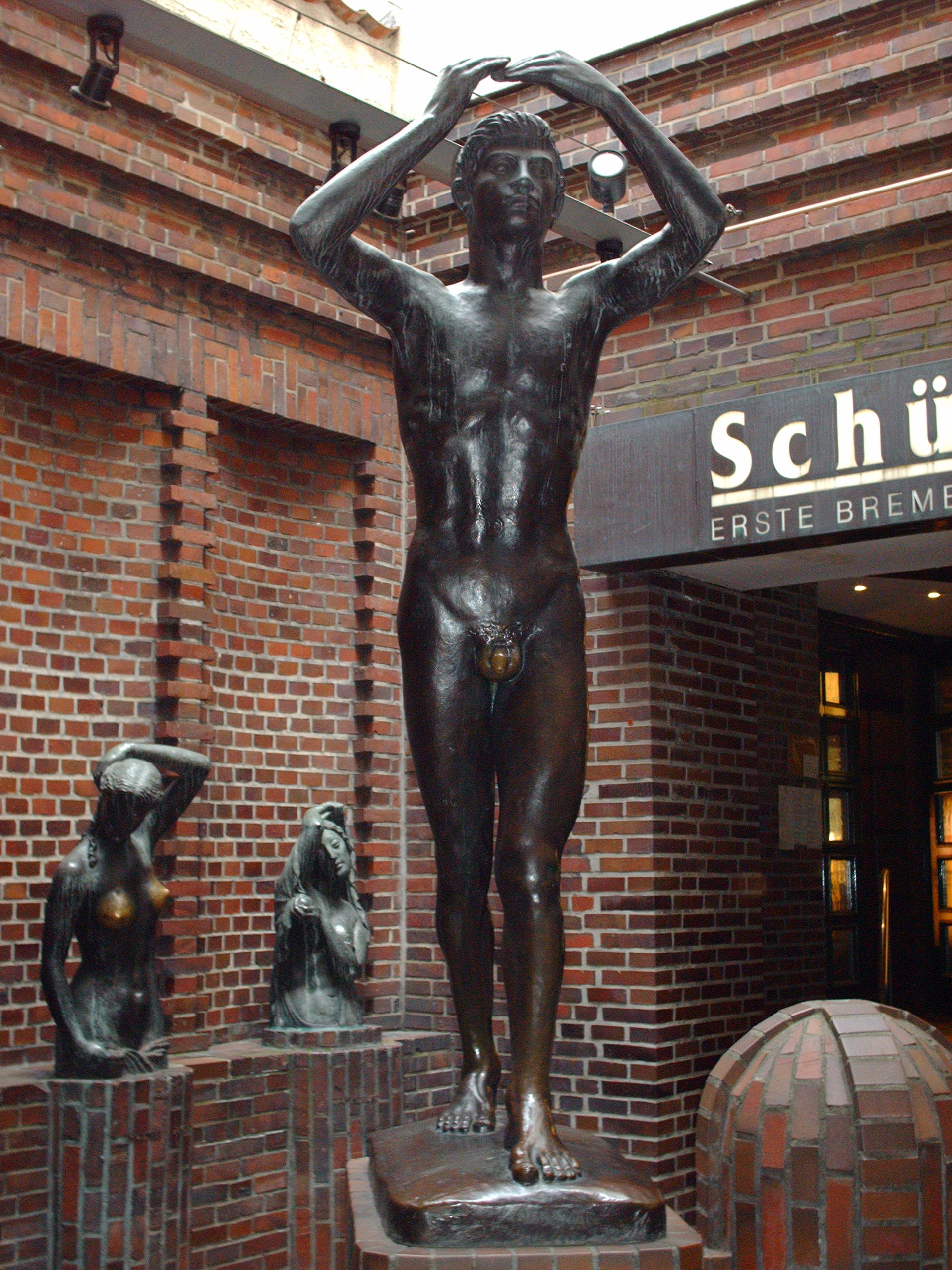 DE: Böttcherstraße - EN: Boettcher Street 1904 Bremen